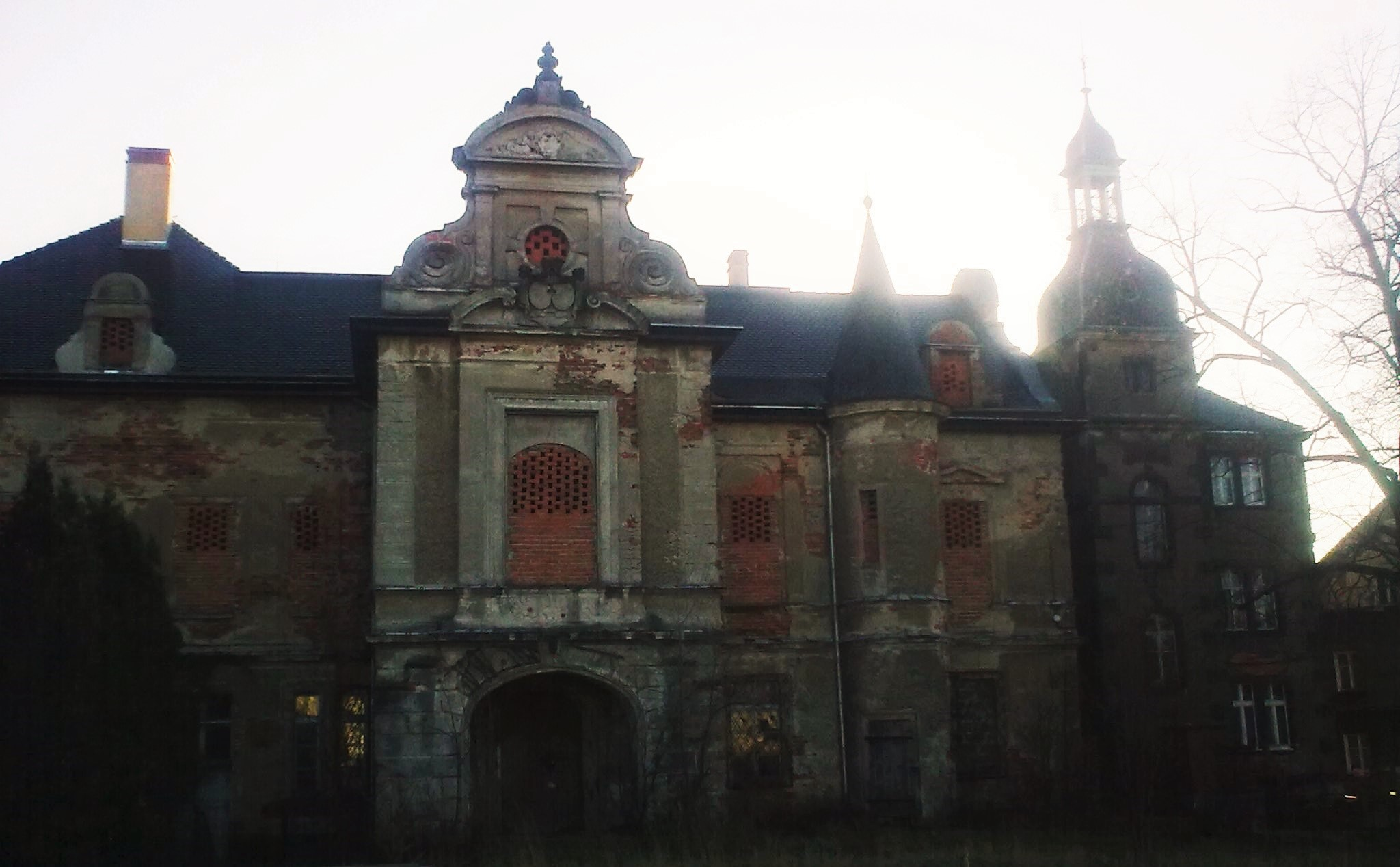 Pałac w Wiśniowej